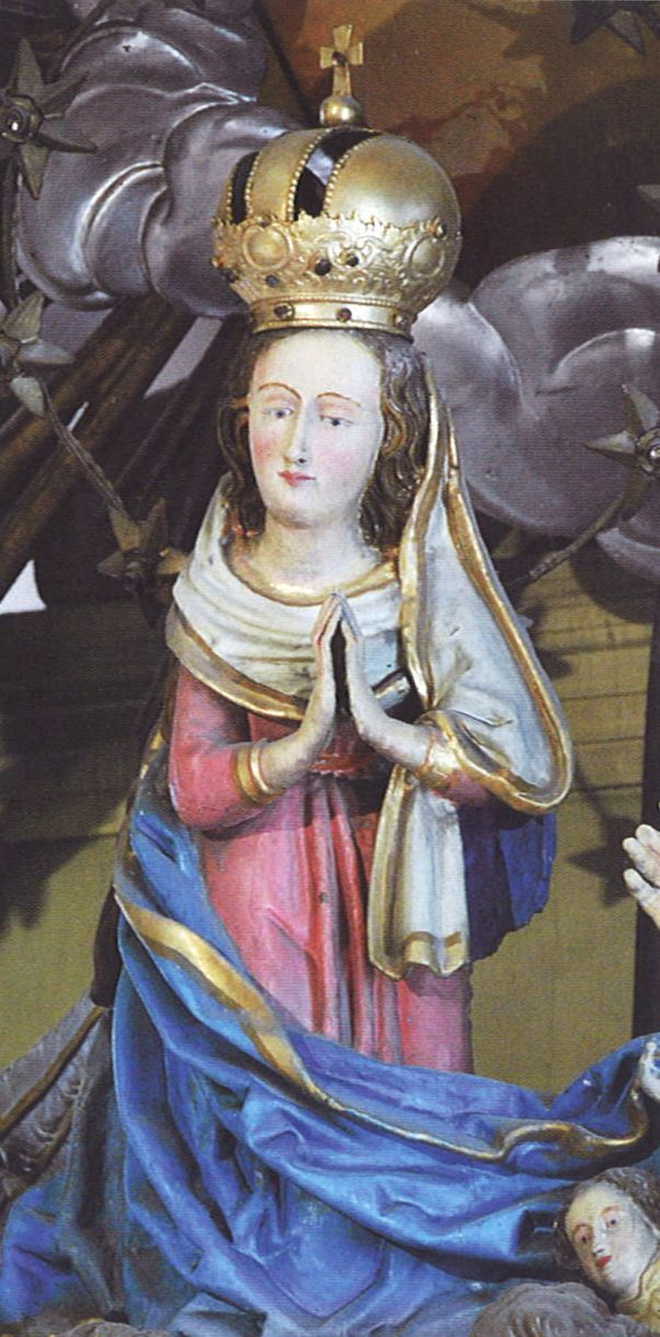 Soška z hlavního oltáře kostela, vznik kolem r. 1500